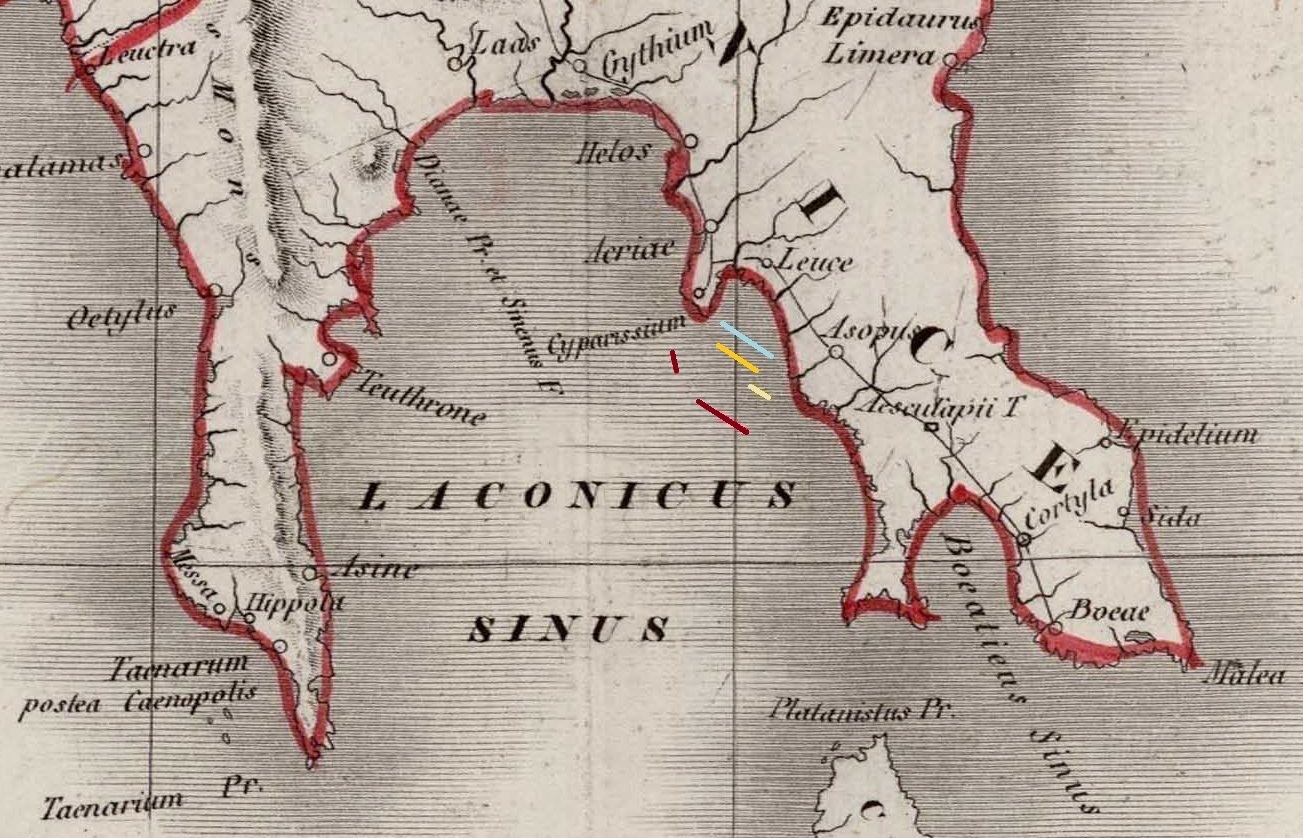 Batalha de Matapão III ― Esquadras de Veneza Viram em Roda (Esquema táctico simplificado) ―09h00: Como resultado da manobra da Madonna dell'Arsenale, toda a vanguarda e o centro da armada de vela cristã vira em roda. A retaguarda ― a esquadra portuguesa ― não acompanha a manobra. As naus venezianas encontram-se assim recuadas, e a esquadra do Conde do Rio Grande ocupa lugar de destaque, frente à vanguarda turca. ― Vermelho: armada otomana. ― Azul: armada de remo cristã. ― Ouro: esquadras de Veneza. ― Branco: esquadra de Portugal. (Vento de SW)